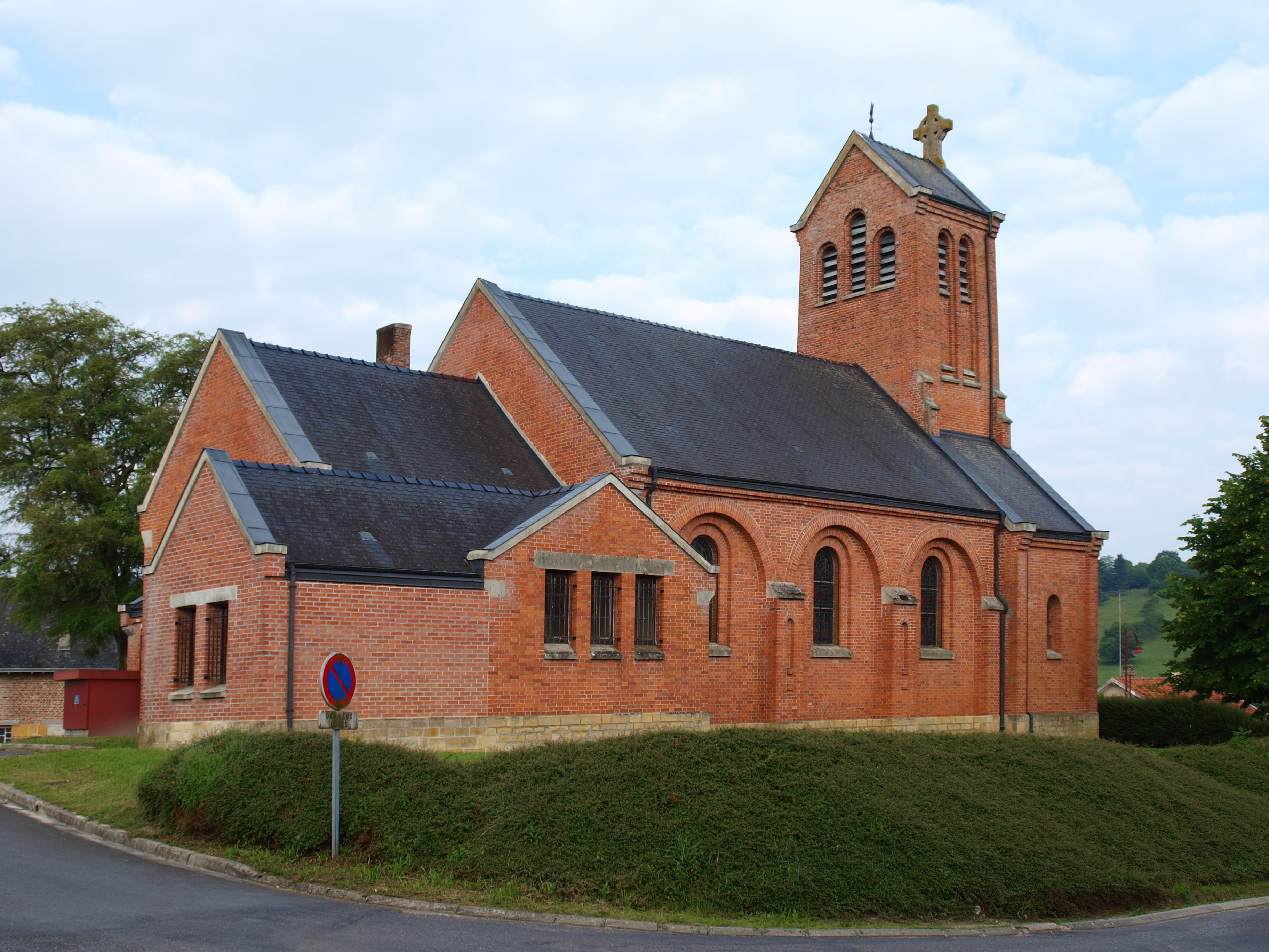 Ballay (Ardennes, France) ; église